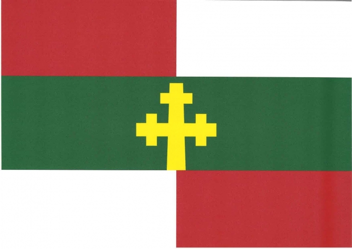 vlajka, Kozly, okres Česká Lípa